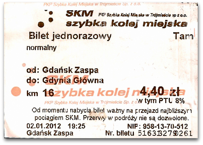 Bilet na kolejkę SKM (trasa Gdańsk Zaspa - Gdynia Główna) wydrukowany przez automat biletowy na przystanku Gdańsk Zaspa. Rok 2012.